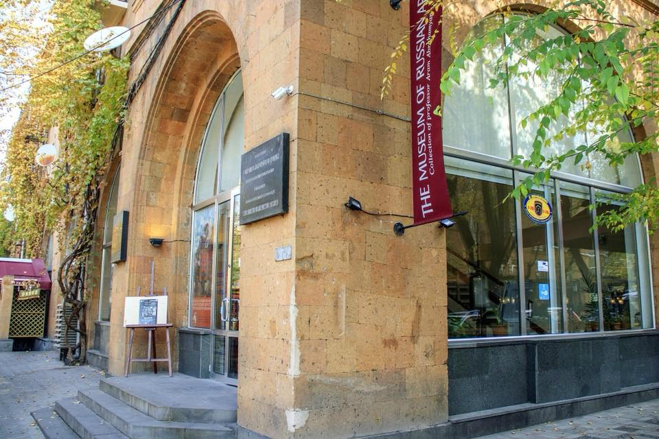 Музей русского искусства